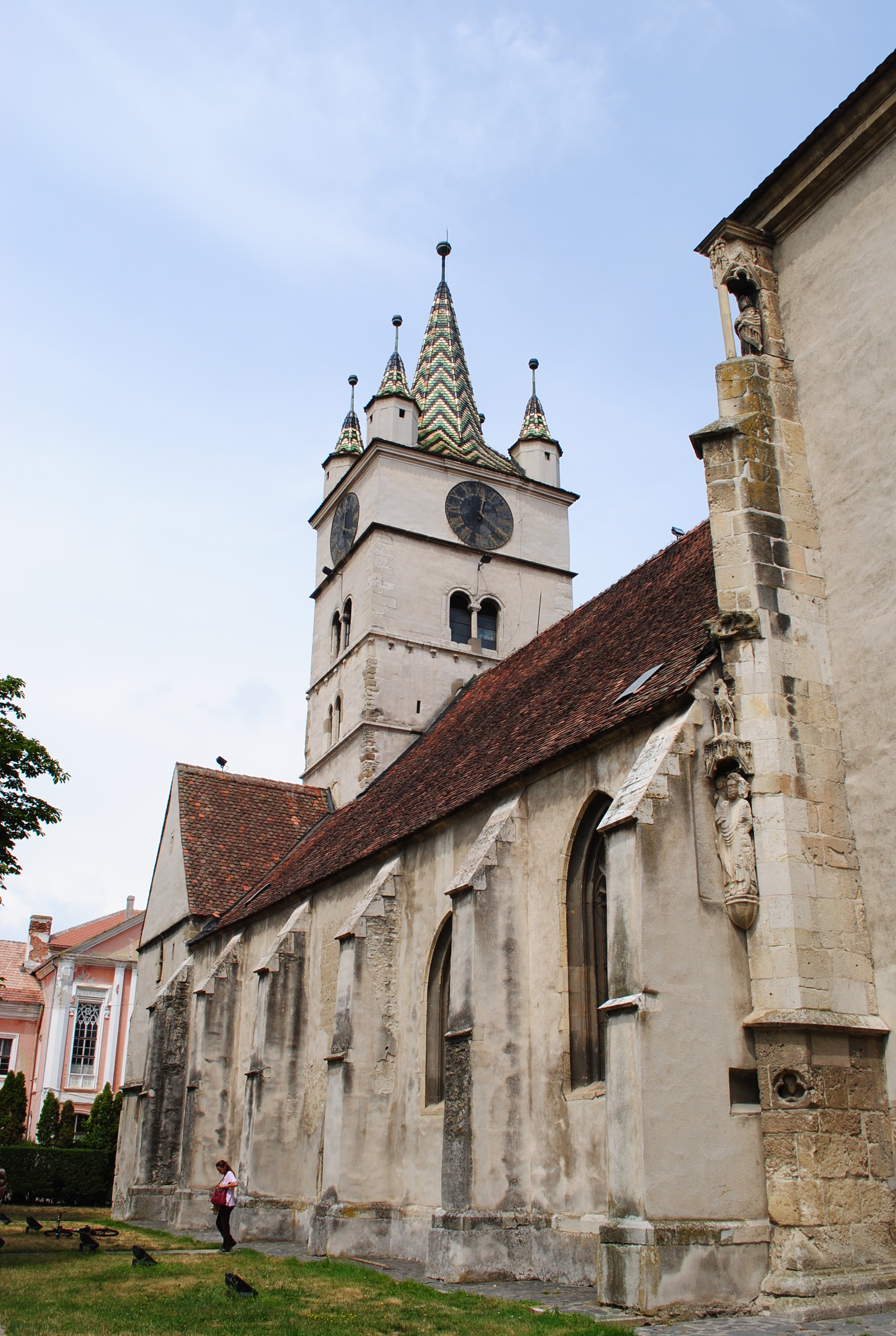 Ansamblul bisericii evanghelice, sec. XIII - XVI